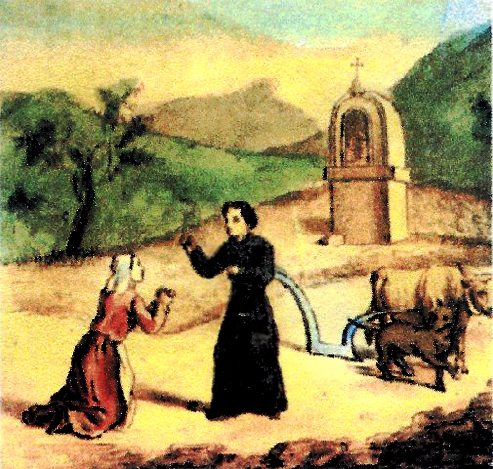 Imberte assoiffée supplie son fils Gens de lui donner à boire